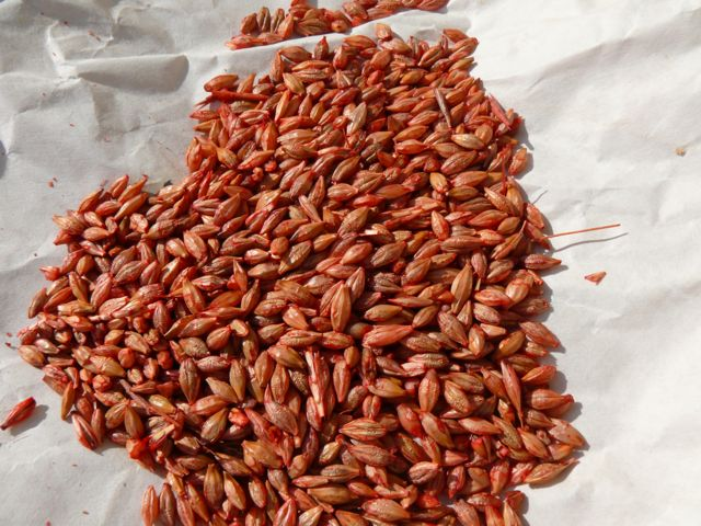 Clorofacinona presentada en granos de cebada utilizados para combatir la plaga de topillos (Microtus arvalis astorianus) en Castilla y León, 2007